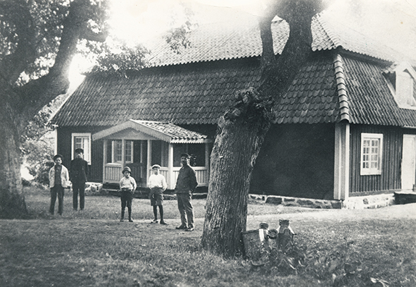 Frösviks gårds 1700-tals flygel